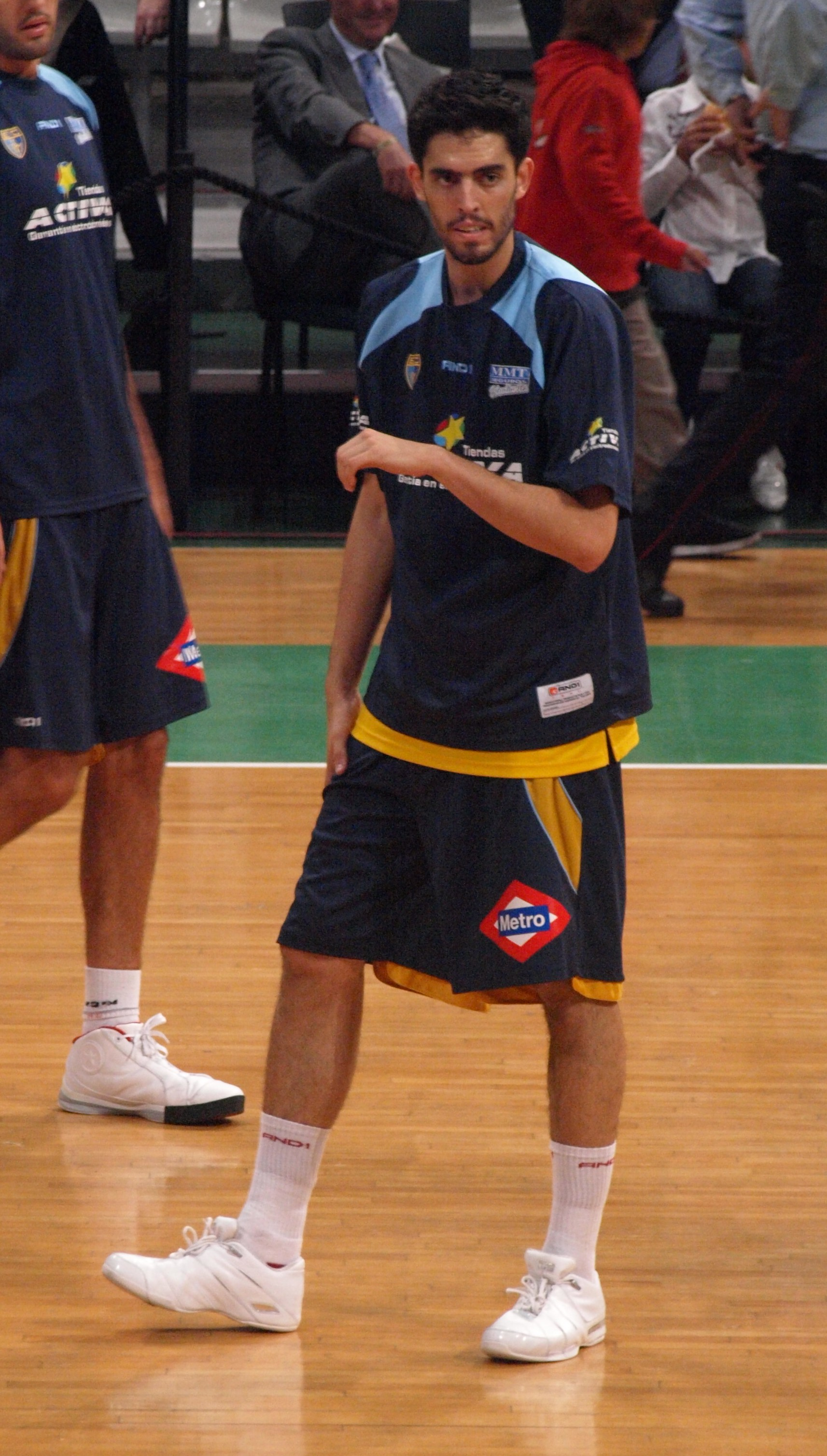 Javier Beirán en el calentamiento previo al partido de la segunda jornada de la liga ACB 2008-09 que enfrentó al Estudiantes y al DKV Joventut en el Olímpico de Badalona.